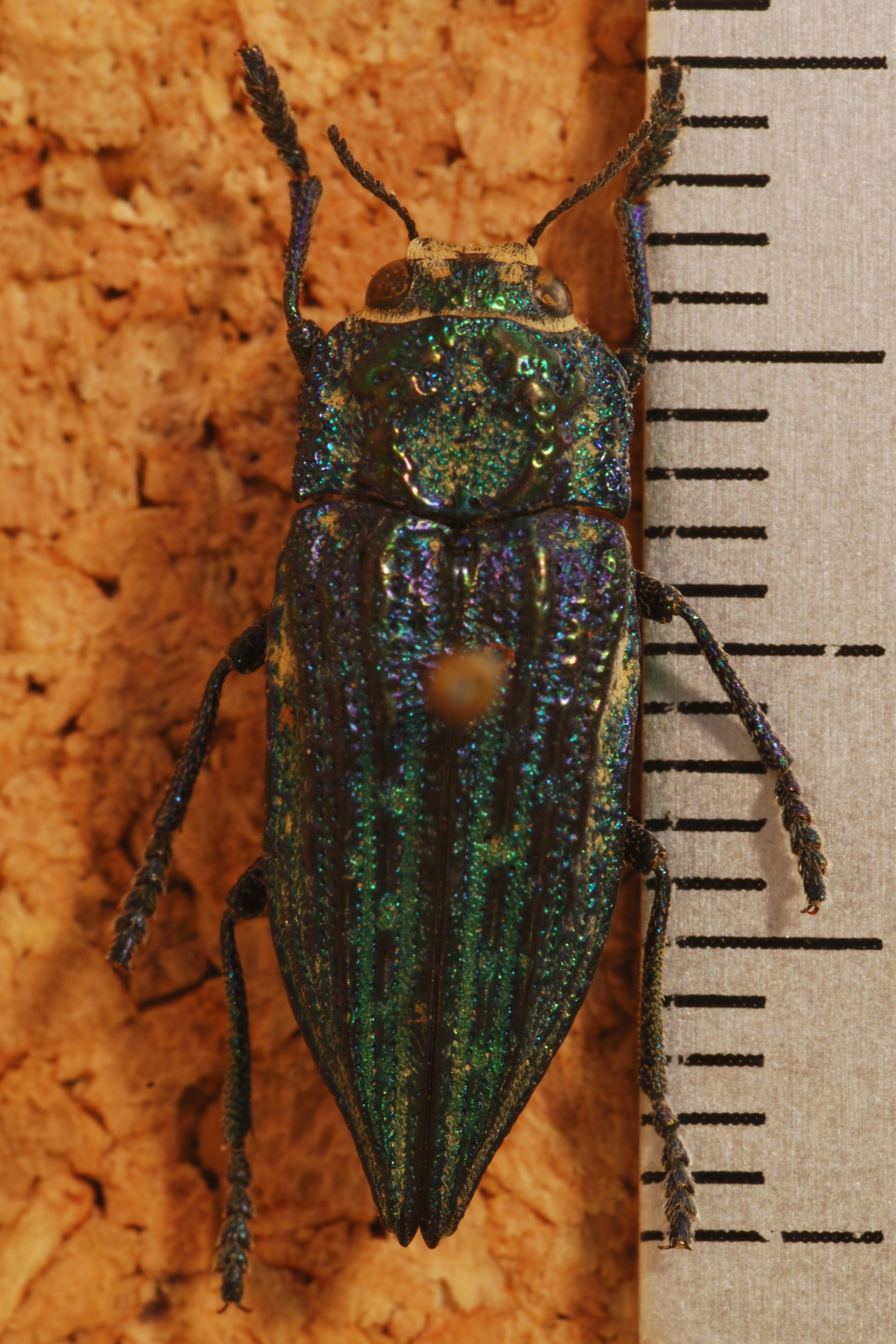 Lo Valdes, CHILE